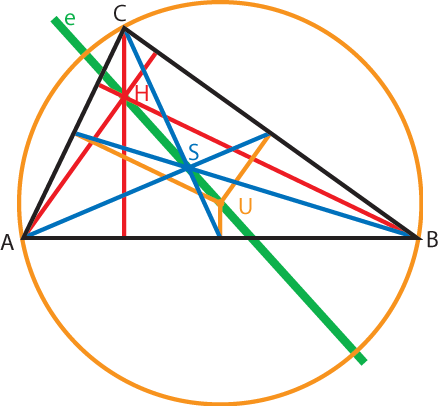 Euler Line